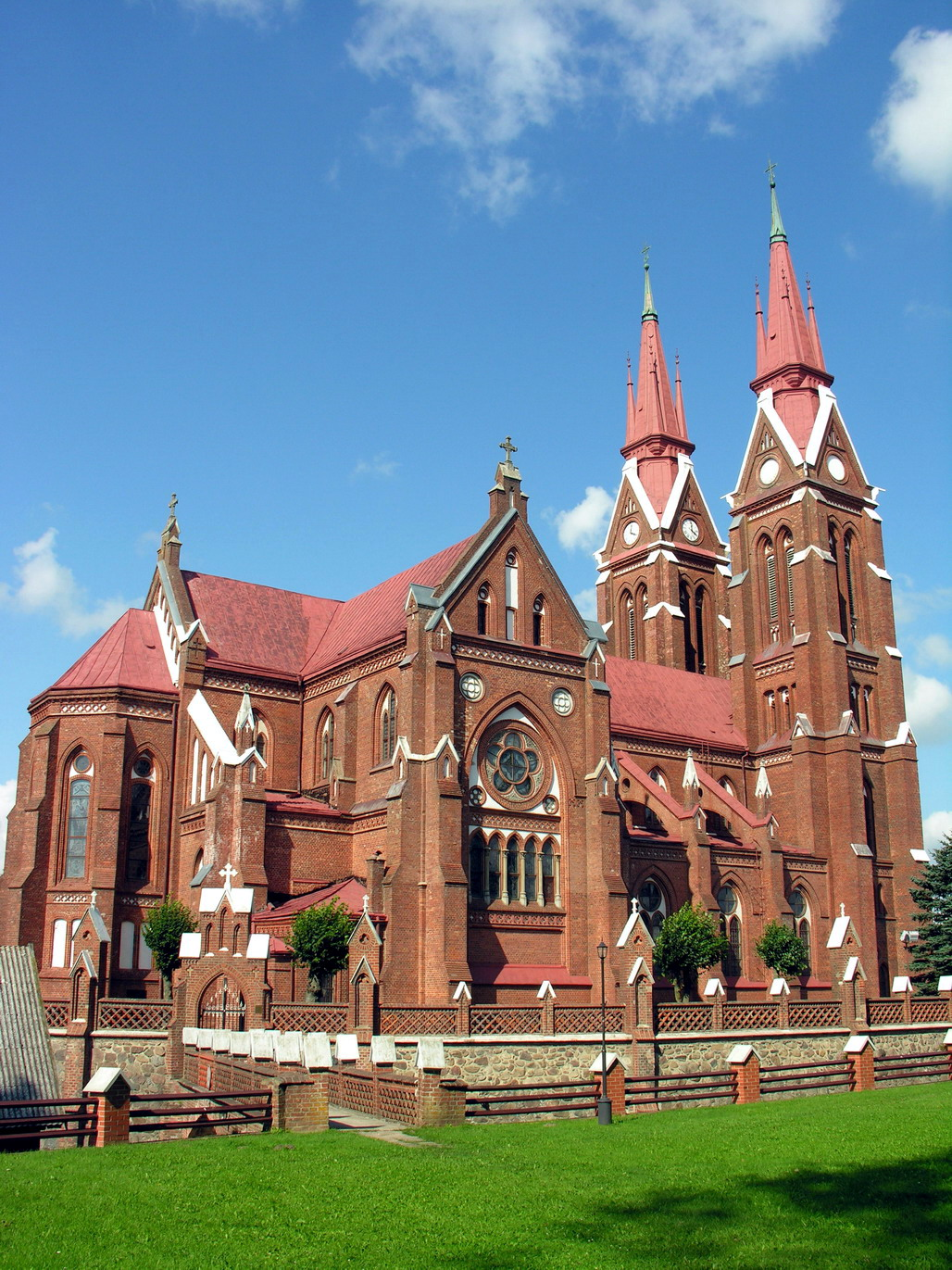 Žemaitėška: Švėikšna, 2007-08-19 ŽemaitėjėLietuvių: Švėkšnos Šv. apaštalo Jokūbo bažnyčia